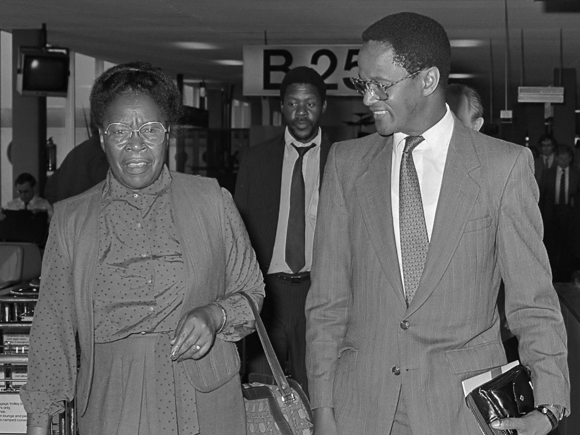 Minister van Buitenlandse Zaken van Botswana, mevrouw Chiepe, wordt op Schiphol begroet door haar ambassadeur Melanu (r) 11 september 1985